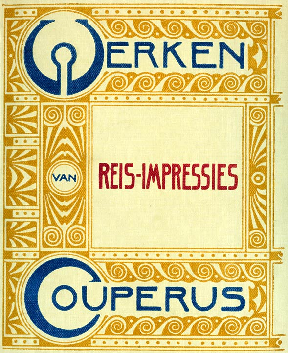 Ontwerp van Berlage